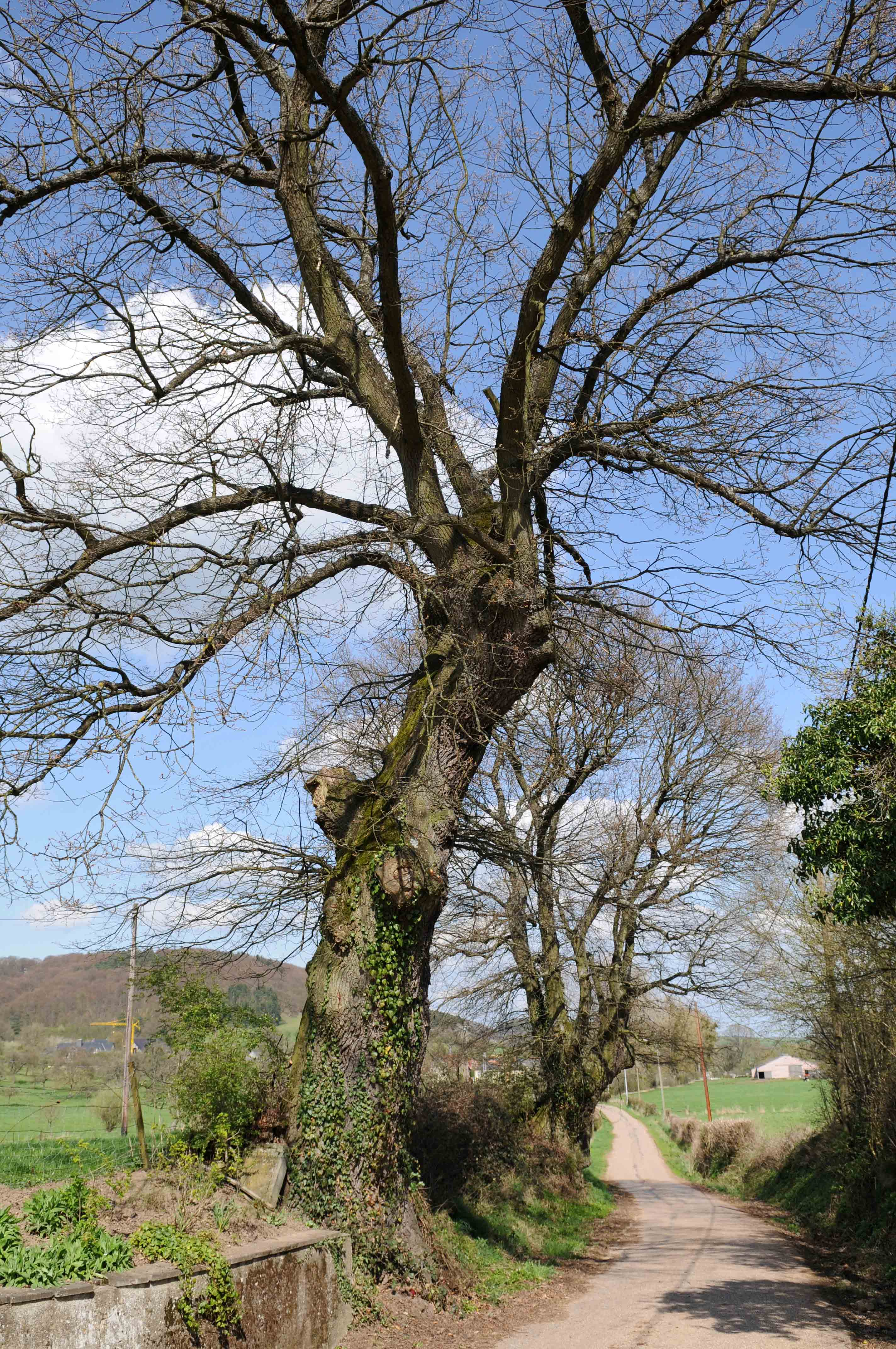 Eechen um Kinséckerhaff.